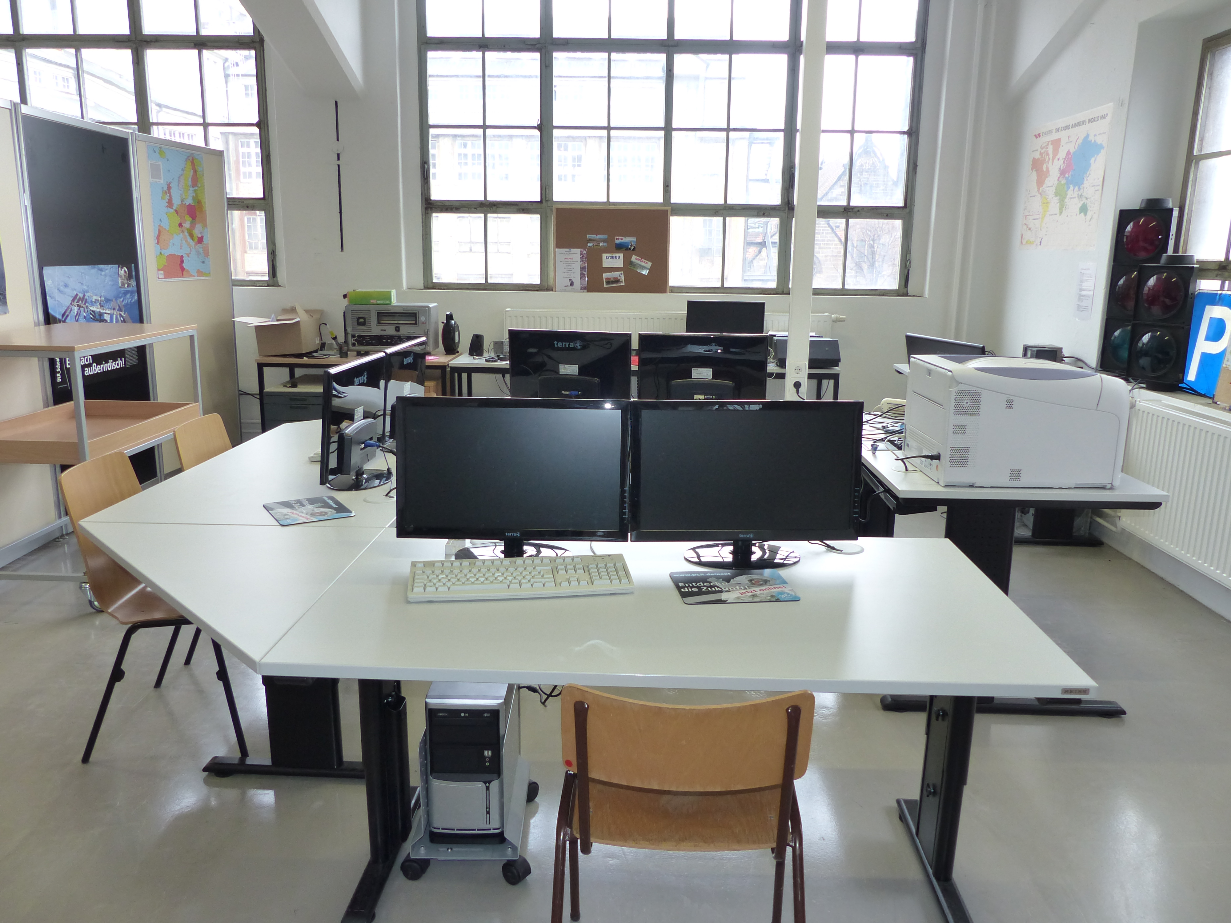 DLR School Lab Dresden, in den Technischen Sammlungen Dresden